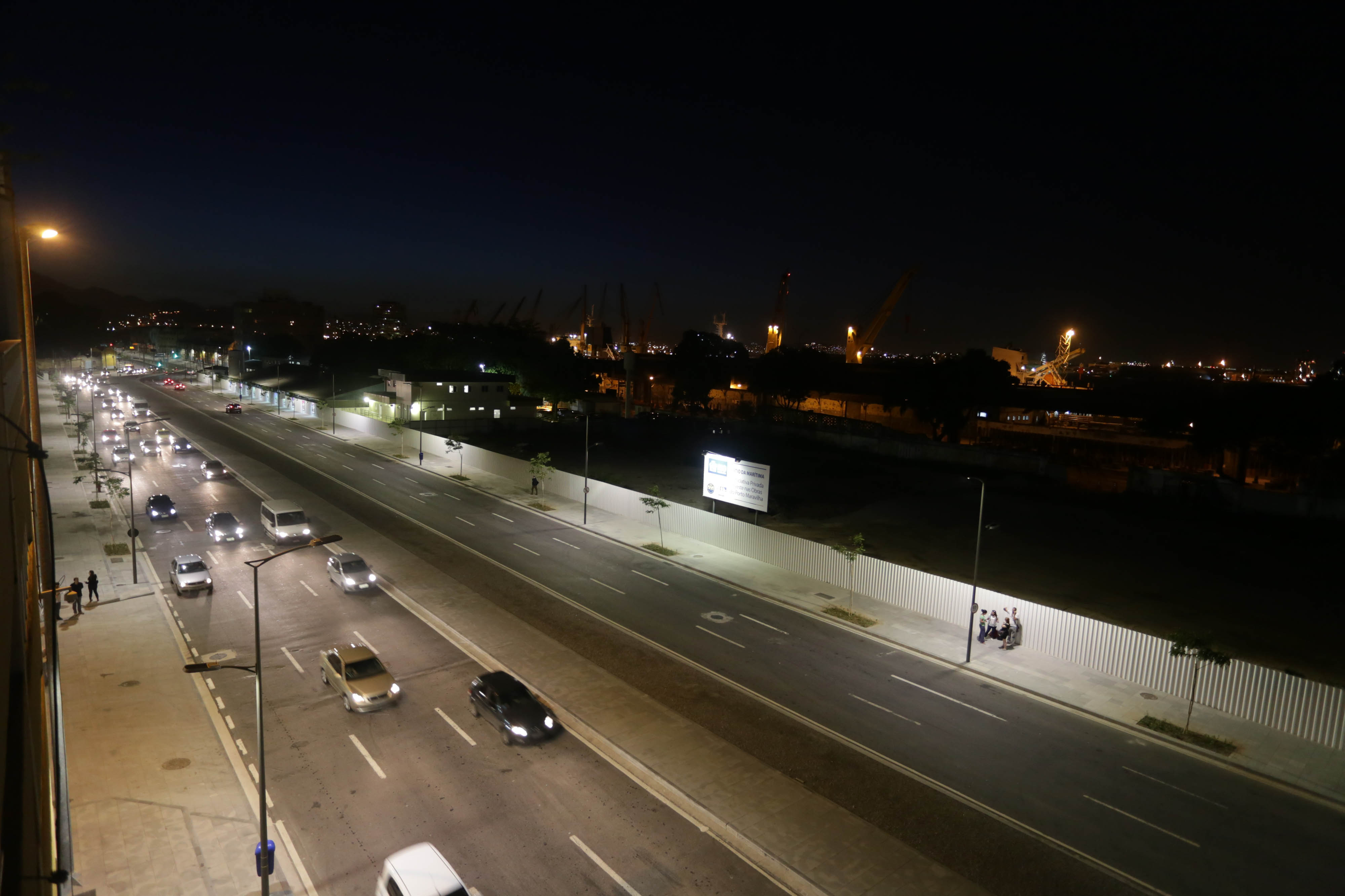 Via Binário do Porto na altura da Cidade do Samba.